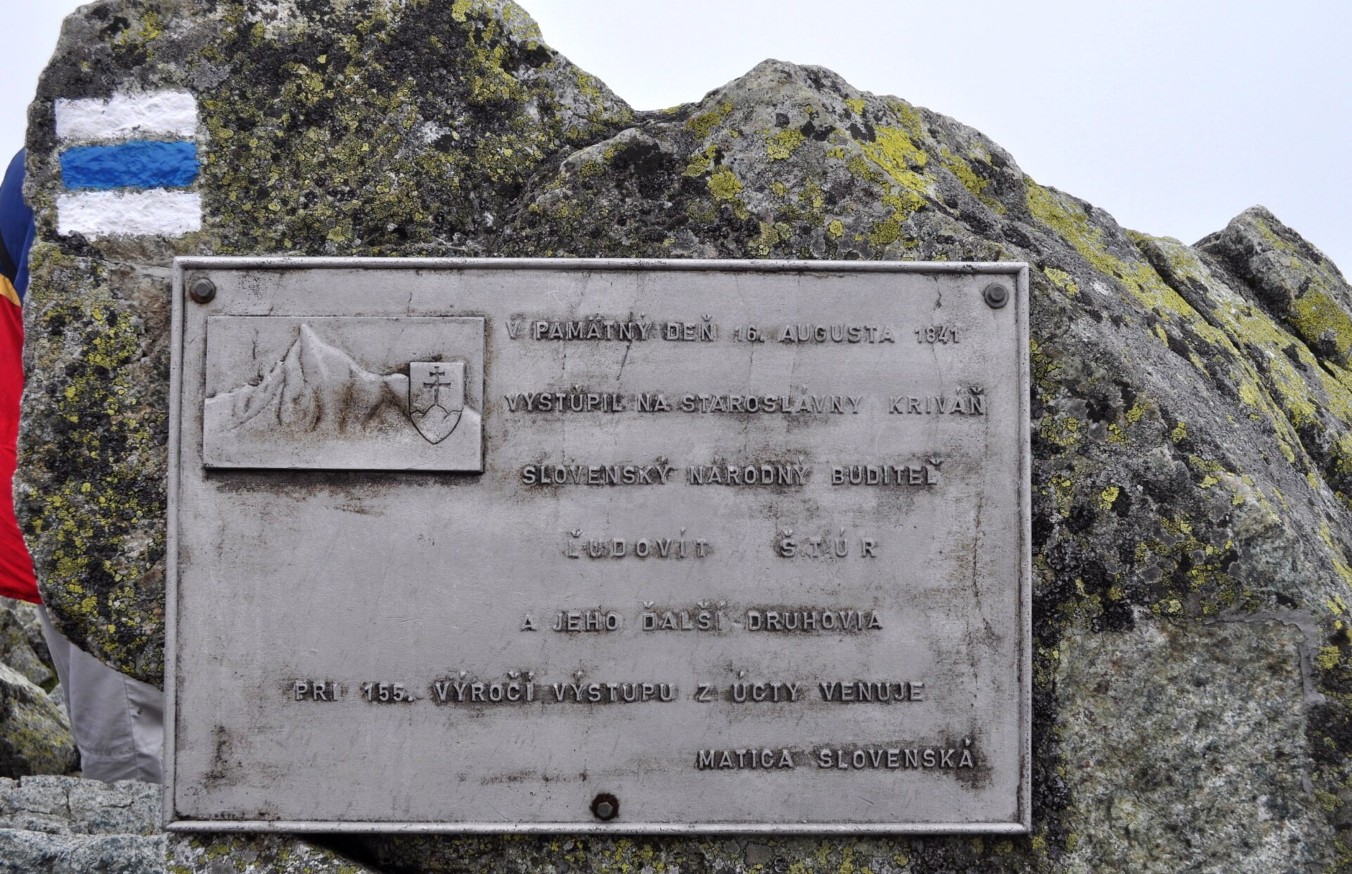 Pamätná tabuľa na výstup štúrovcov